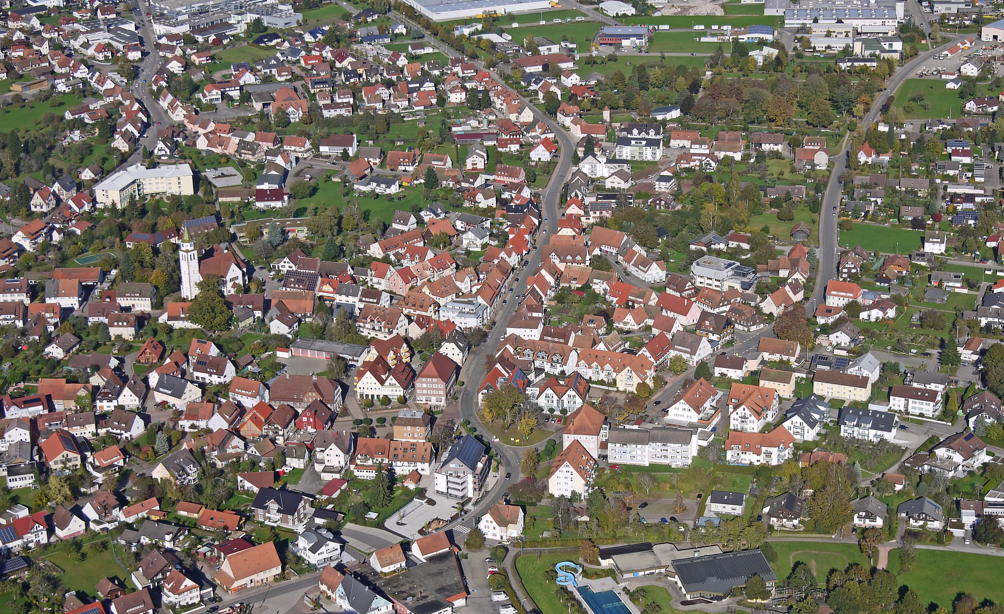 Luftbild Pfalzgrafenweiler Ortsmitte von Westen